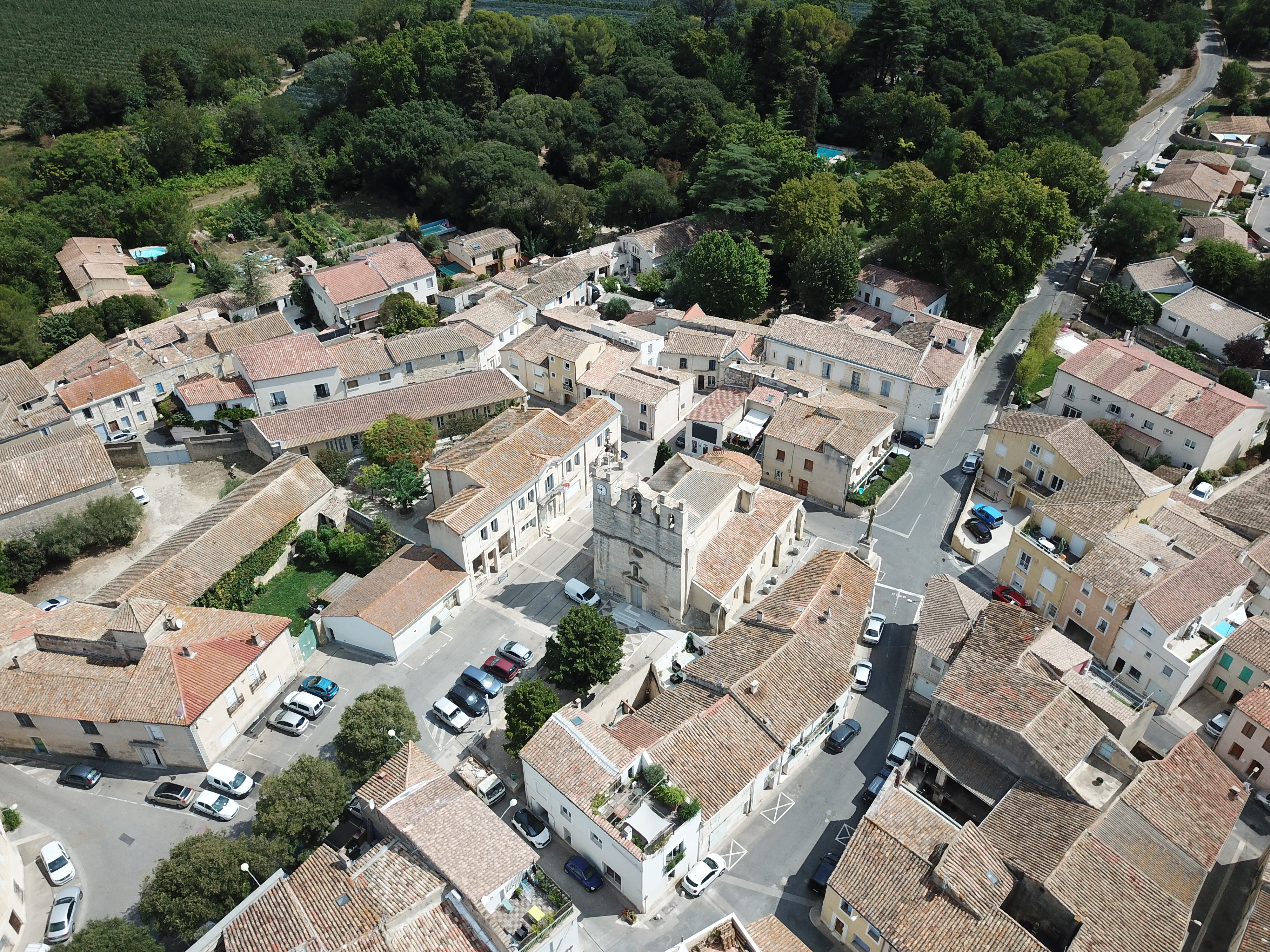 Vue aérienne de l'église et de la mairie de Mudaison en août 2019